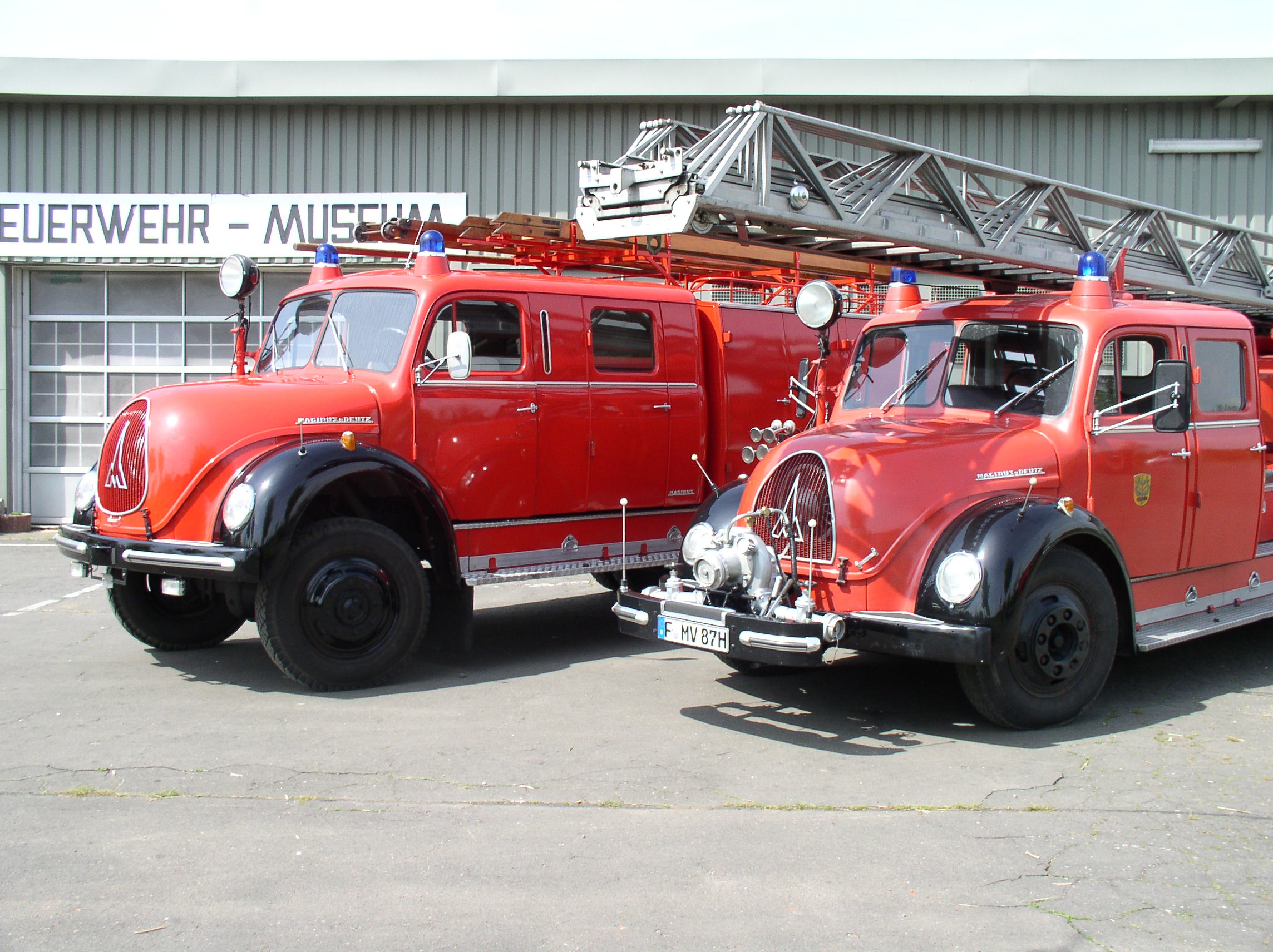 Historische Löschfahrzeuge am Feuerwehr-Museum Frankfurt. Hinten ein Löschgruppenfahrzeug, vorne eine Drehleiter. Beide Magirus-Deutz „Rundhauber“, Baujahr unbekannt.